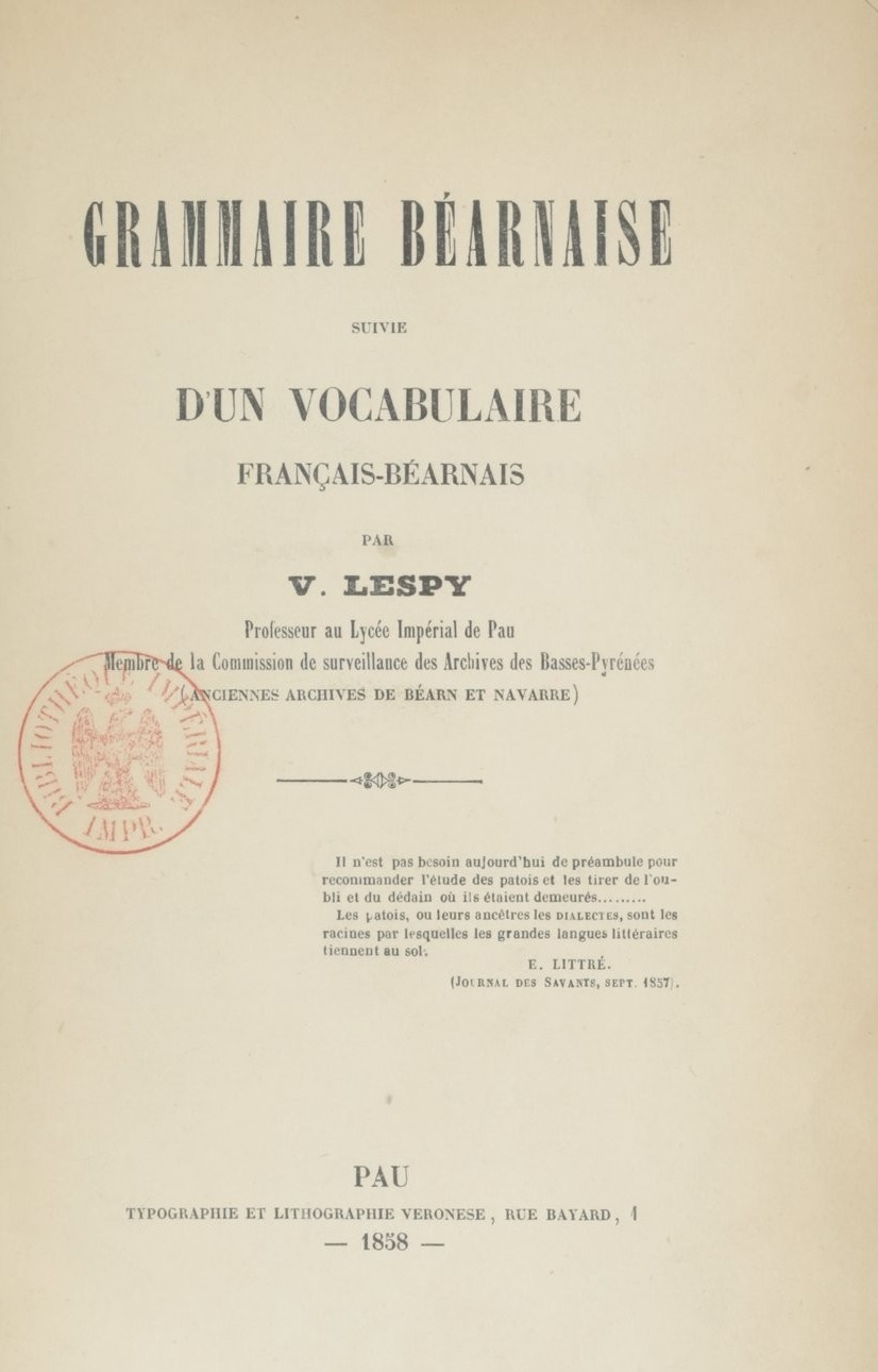 Grammaire béarnaise ; suivie d'un Vocabulaire français-béarnais / par V. Lespy